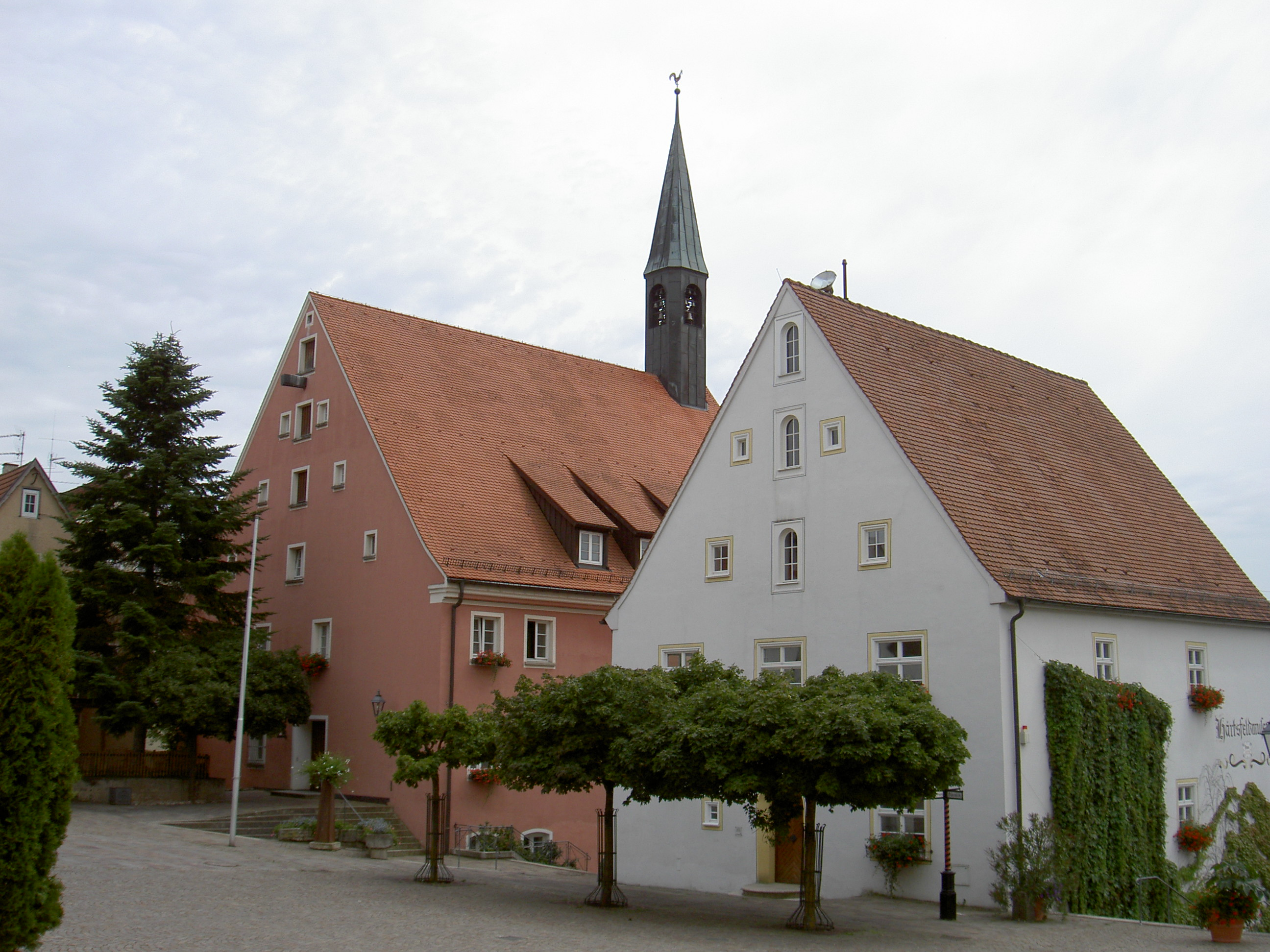 Neresheim Vogthaus / Härtsfeldmuseum und Rathaus Rückseite